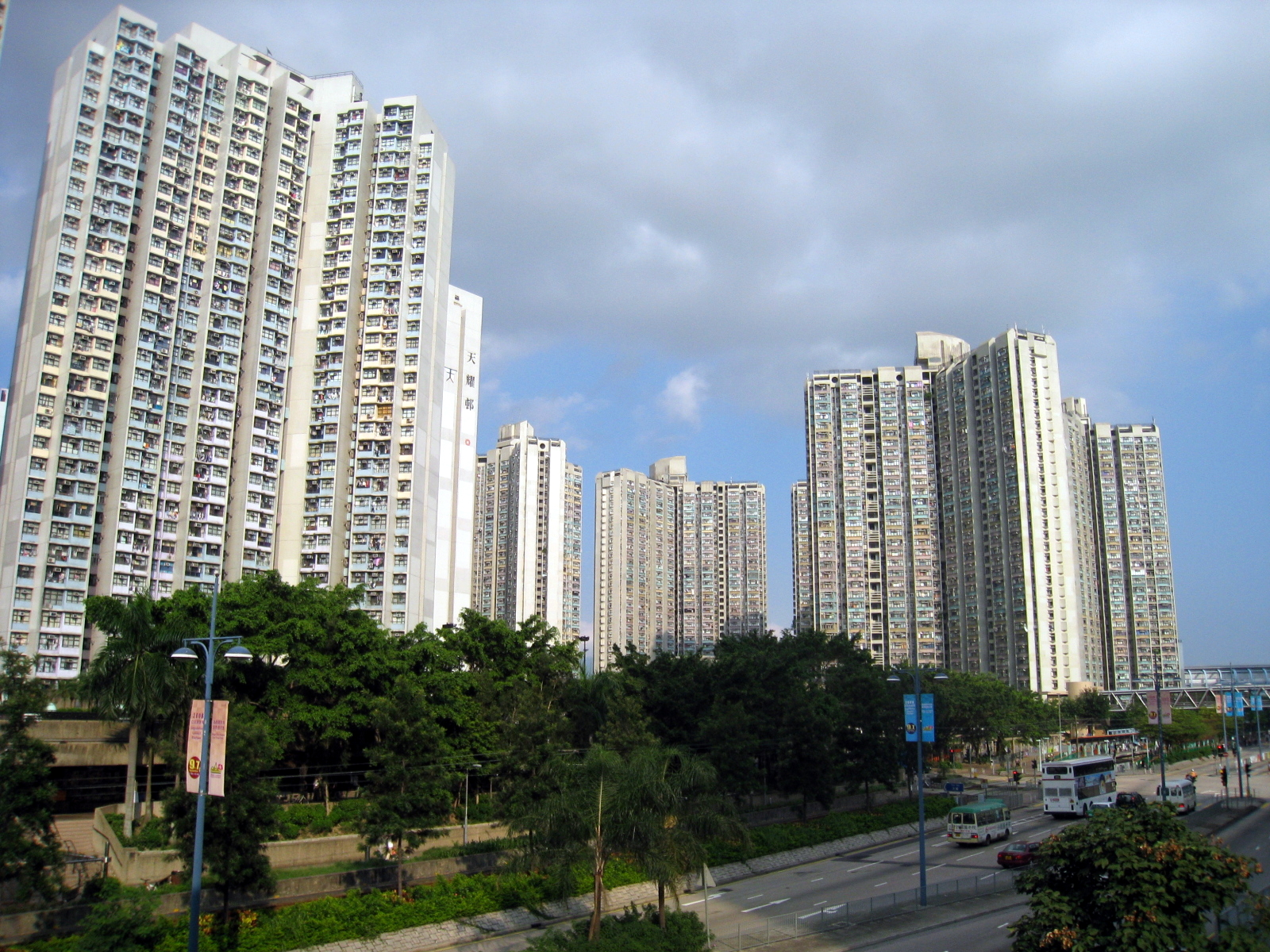 Tin Yiu Estate Overview 天耀邨